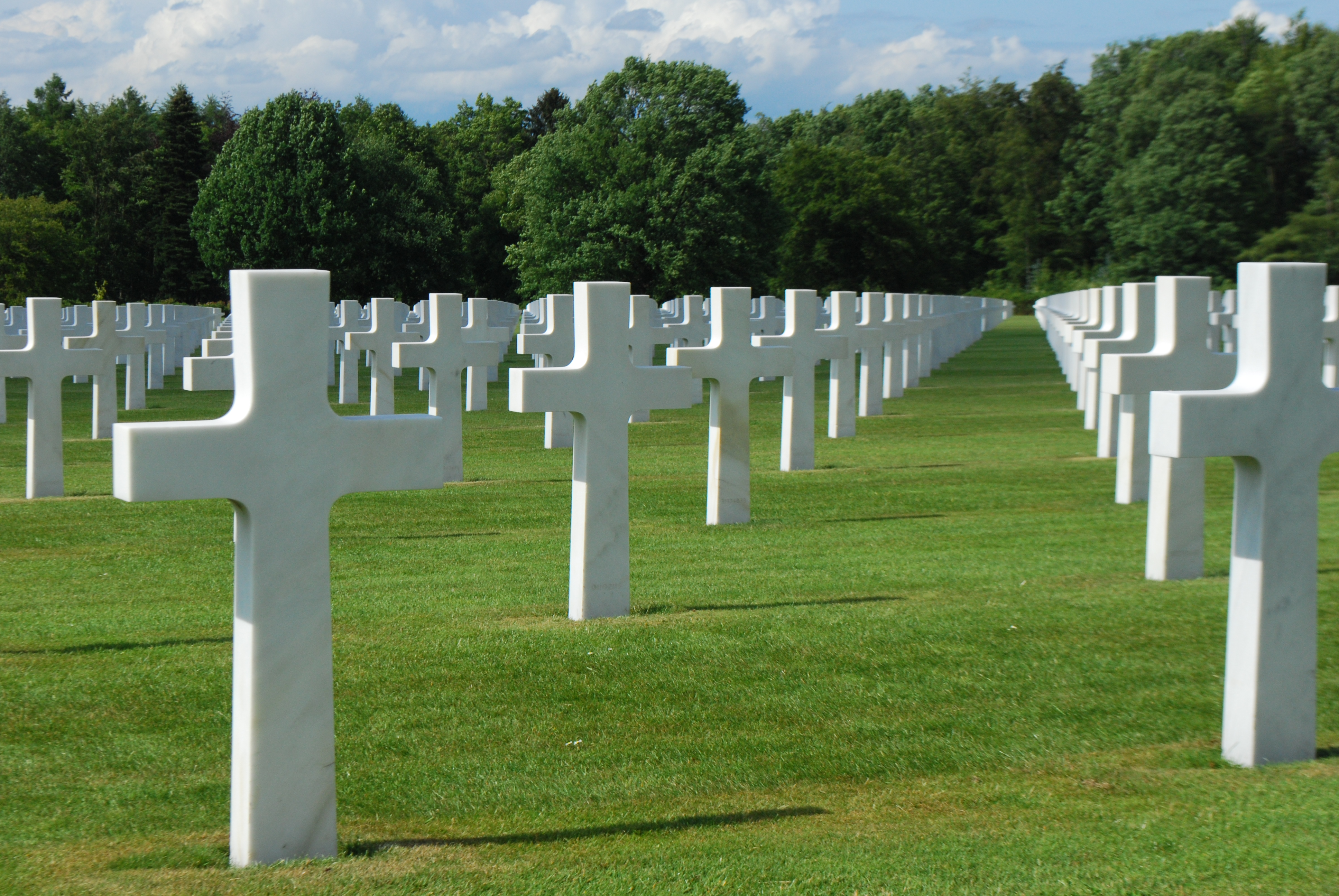 Le cimetière de l'armée des Etats-Unis d'Amérique à Neuville-en-Condroz (Neupré, Belgique).